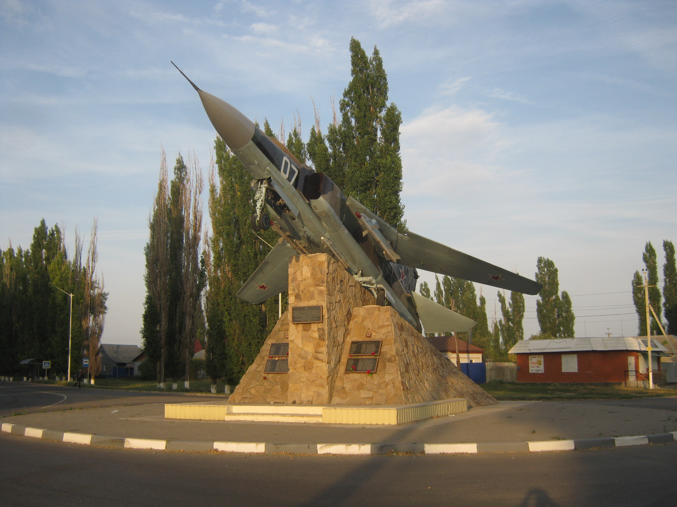 МиГ-23 МЛД (Бобров)